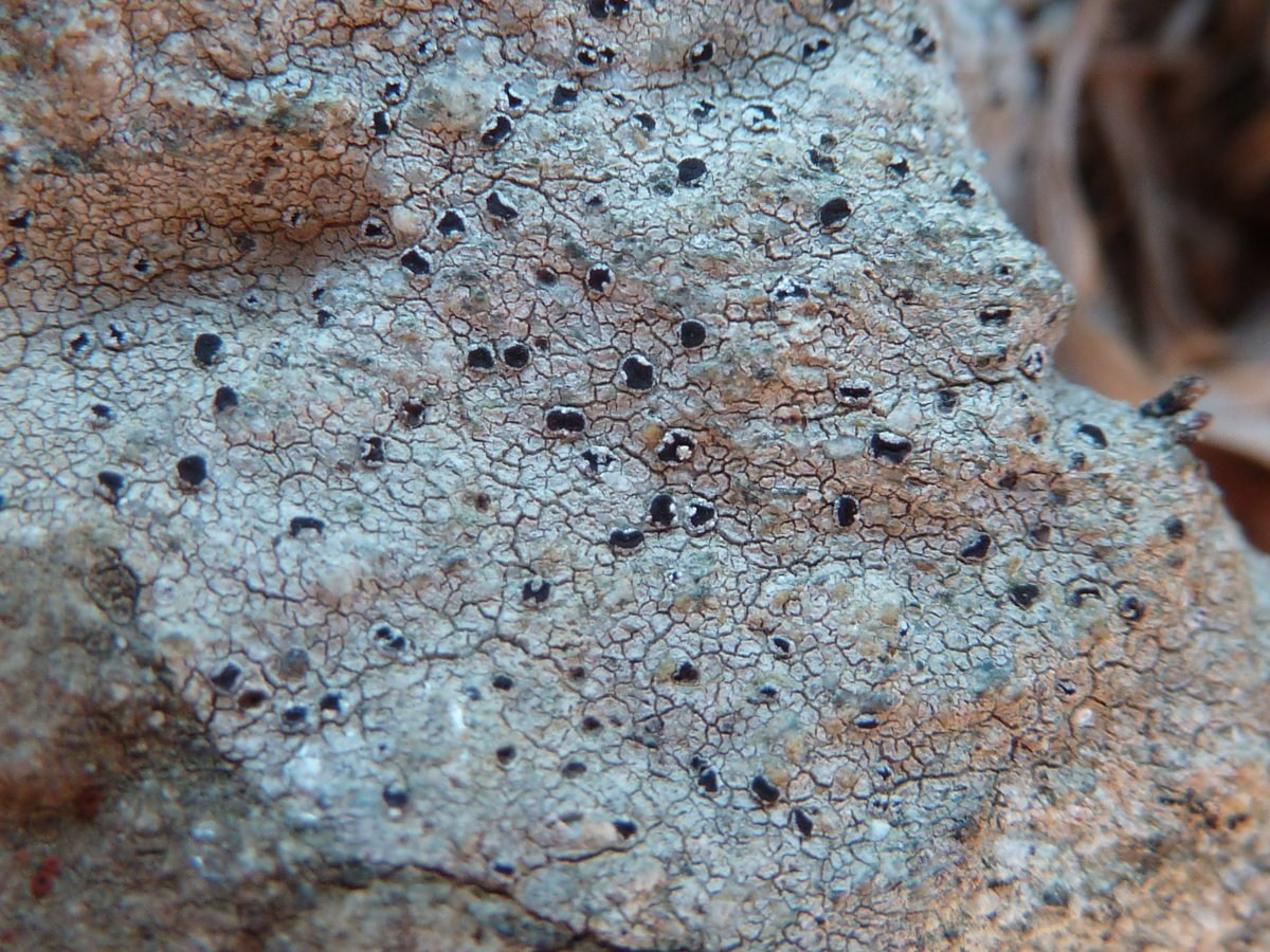 Trapelia coarctata, Languidou, Plovan, Finistère, Bretagne, France